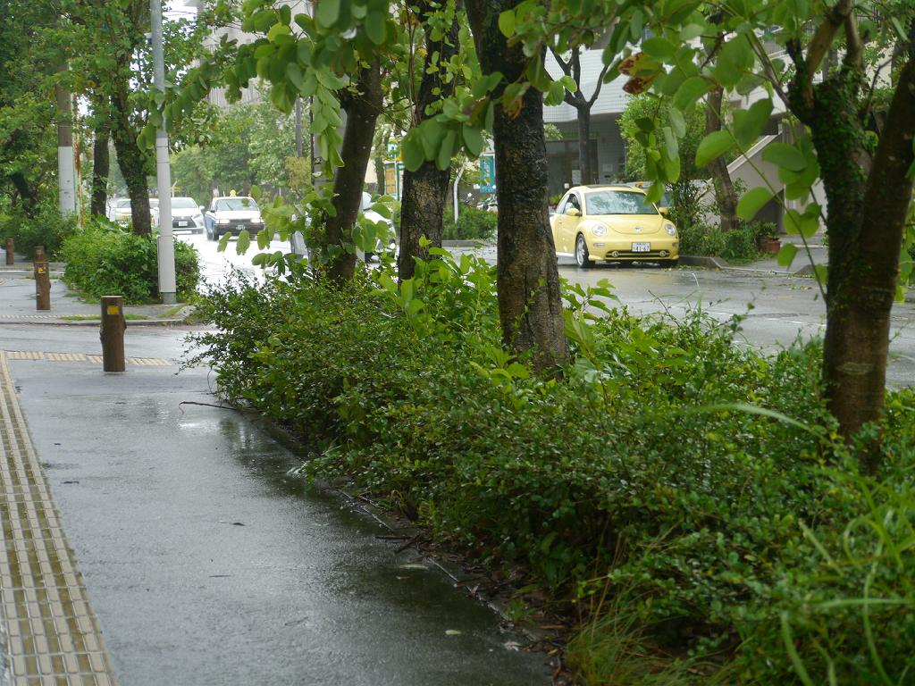 Carmona retusa：フクマンギ 2015/08/24 沖縄本島：Okinawa Island, Japan 那覇市の街路で